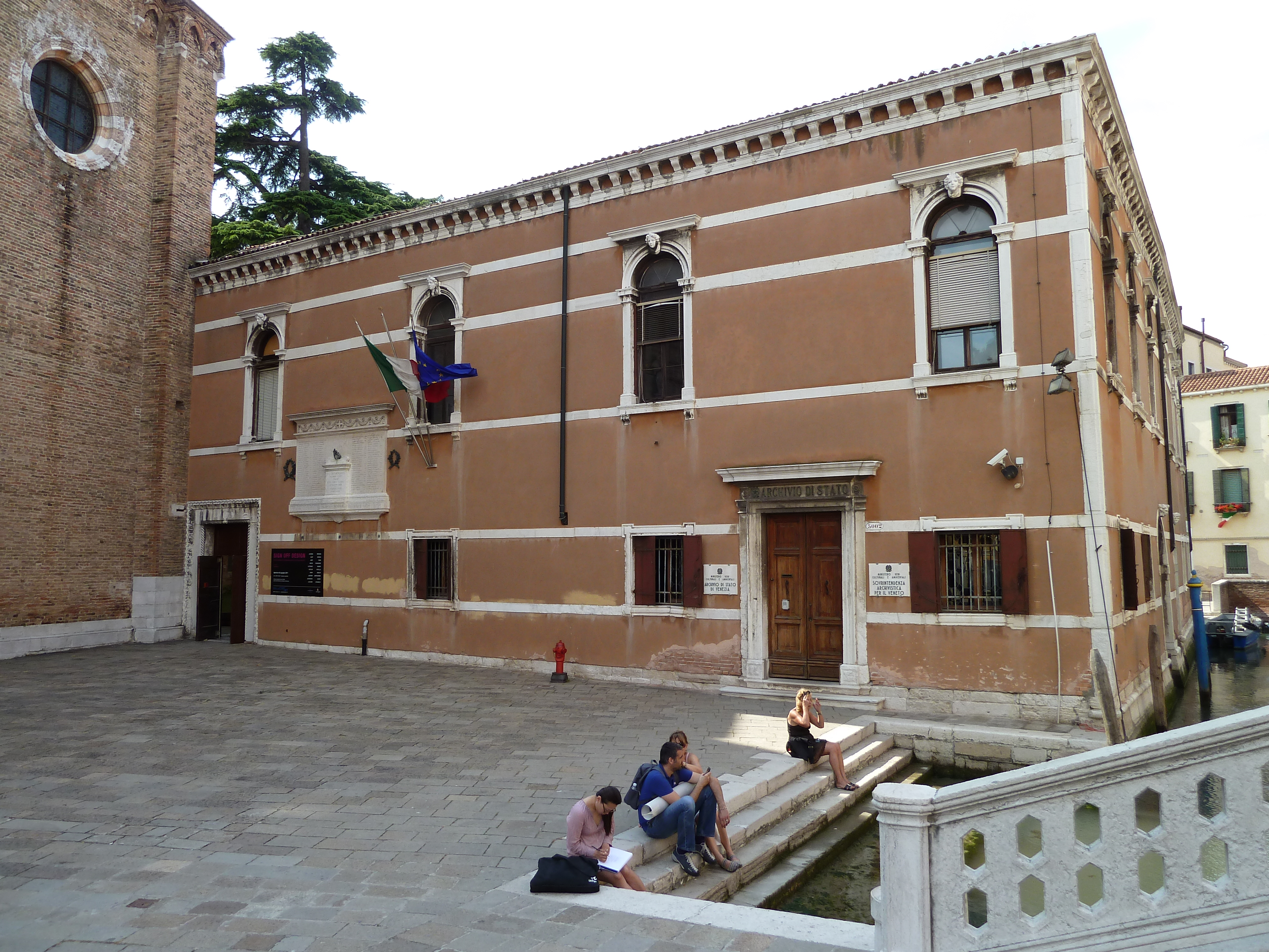 archivio di stato